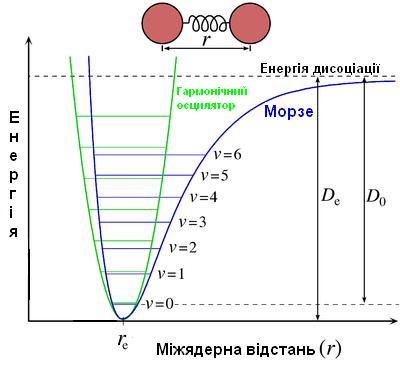 Потенціал Морзе: Порівняння з потнеціалом гармонічного осцилятора